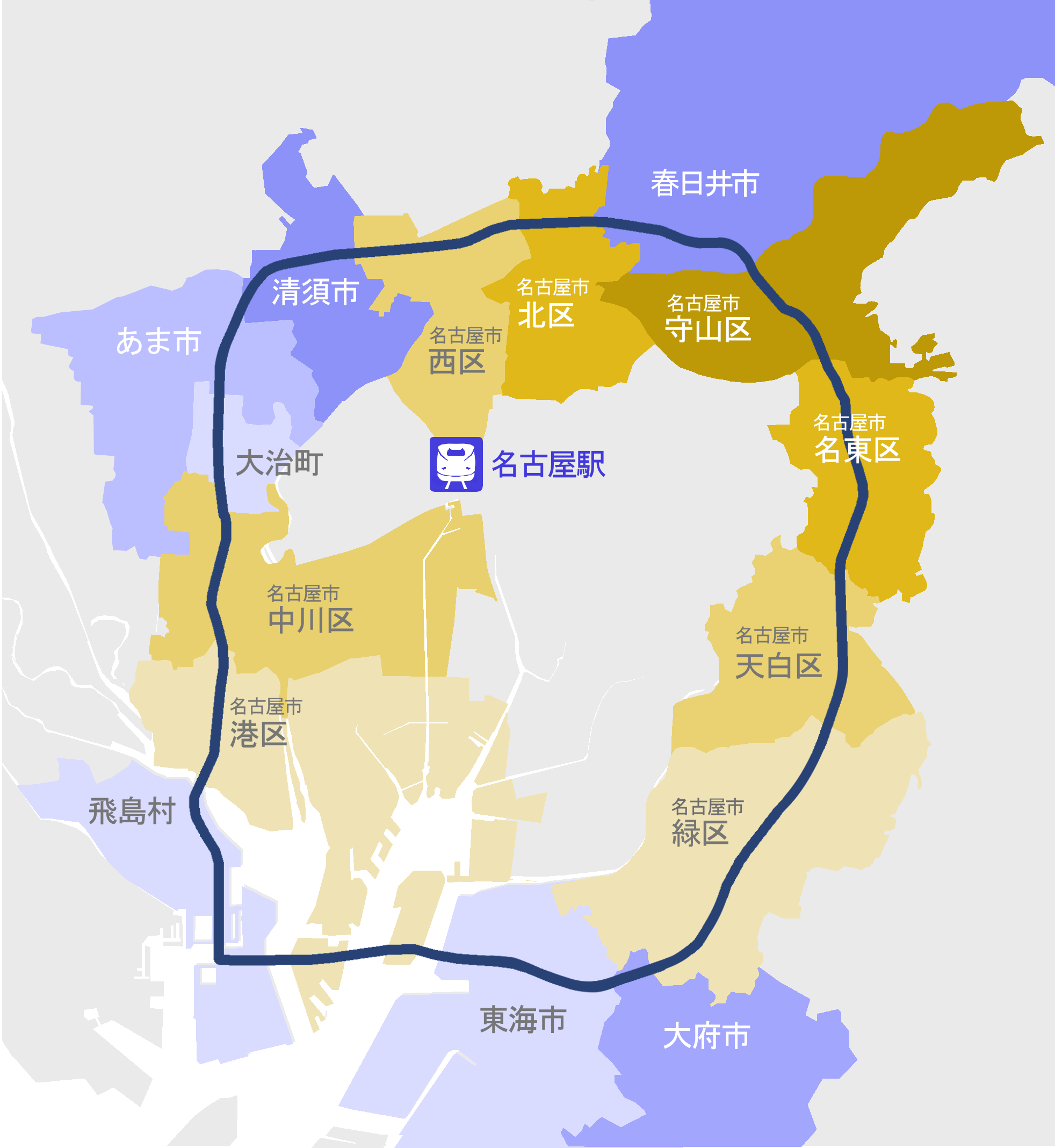 名古屋環状2号線 通過市区町村